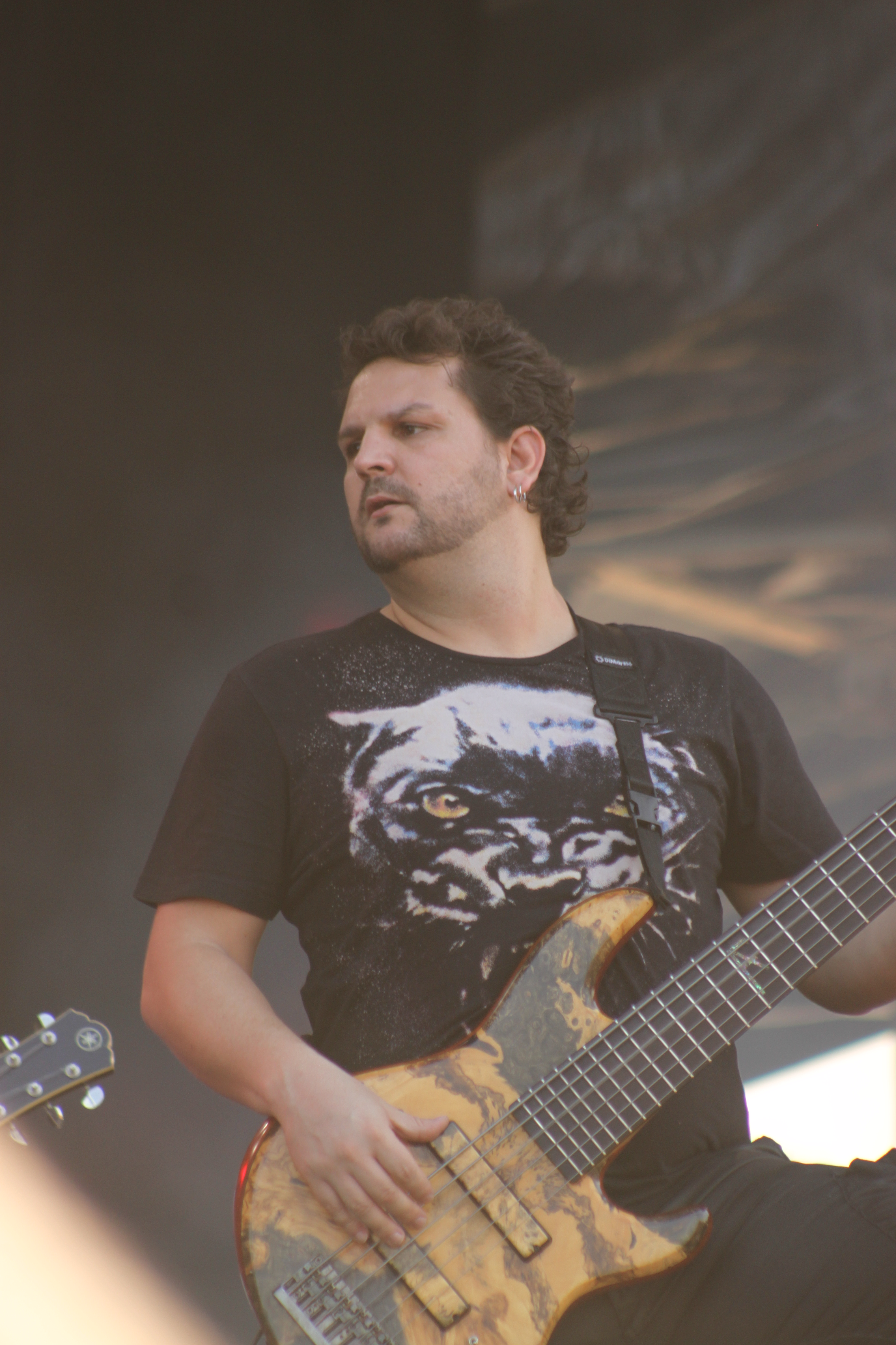 Hellfest 2014. Felipe Andreoli, Angra. Fr-44-Clisson.